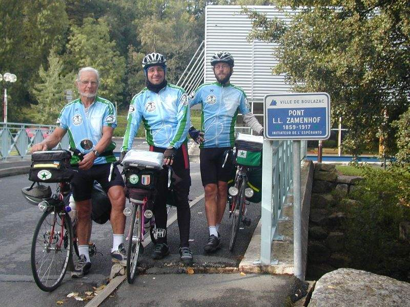 Membres de l'association mondiale de cyclistes esperantistes (BEMI) devant le pont Zamenhof, à Boulazac.